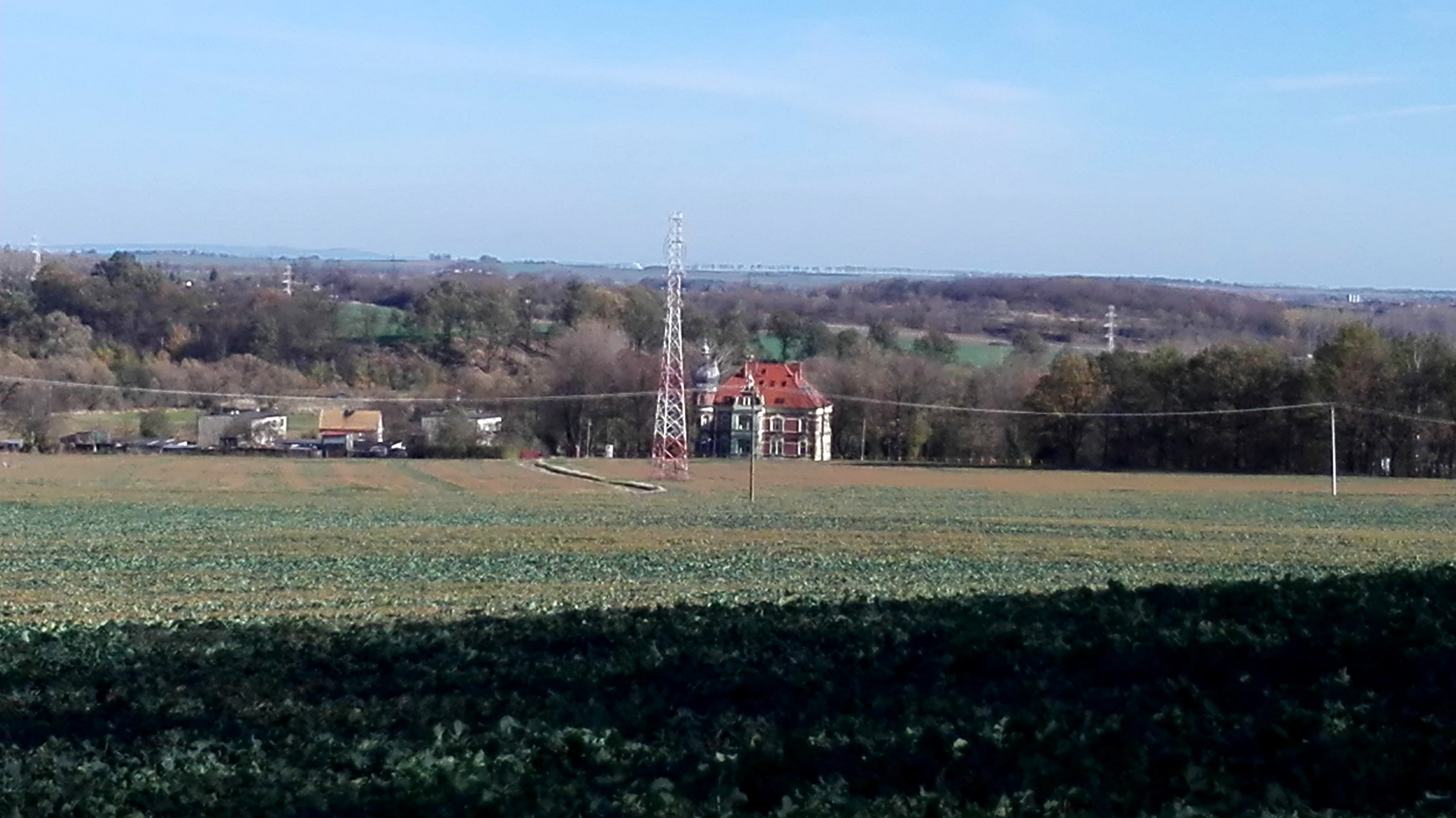 Prudnik, widok z podnóża Kaplicznej Góry na panoramę Prudnika Lipy – Dyrekcja Stadniny Koni Prudnik